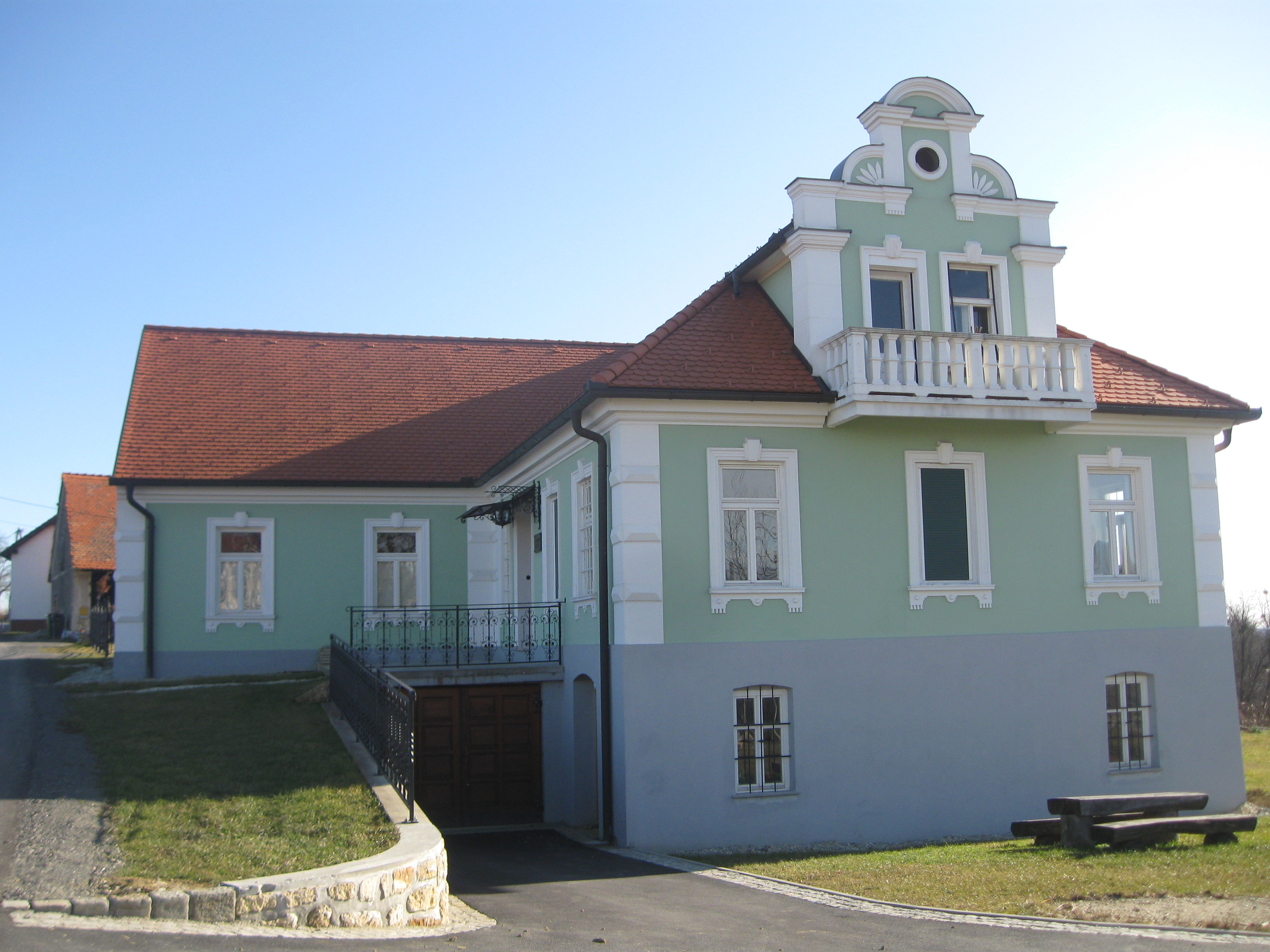 Rojstna hiša Riharda Tušak, danes je v njej privatna muzejska zbirka Feliksa Rajh.